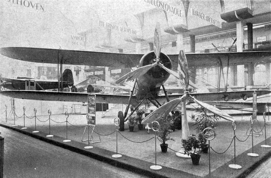 Letov Š-528, aerosalon Paris 1936 (Letectví, listopad 1936)